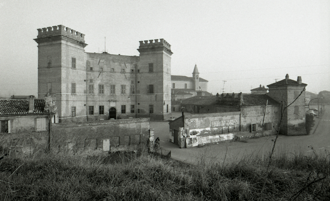 Servizio fotografico : Mesola, 1975 / Paolo Monti. - Strisce: 6, Fotogrammi complessivi: 35 : Negativo b/n, gelatina bromuro d'argento/ pellicola ; 35 mm. - ((Sul portanegativi: N[I]K[MA]T FP4. - Occasione: Documentazione del territorio della provincia di Ferrara e centri storici minori. - Fonte: Agenda di Paolo Monti: Leica 1501-3000 Controllo numerazione (1950-1978), presso Archivio Paolo Monti. - Fonte: Fattura di Paolo Monti: IV. Commesse/ Fattura n. 11 (1975/04/29), presso Archivio Paolo Monti. - Fonte: Monografia: Territorio ferrarese: un programma di governo della Regione e delle autonomie locali, catalogo della mostra, Ferrara 1975, a cura di Roberto FREGNA, Modena, Soc. Immobiliare & Poligrafica emiliana (1975)